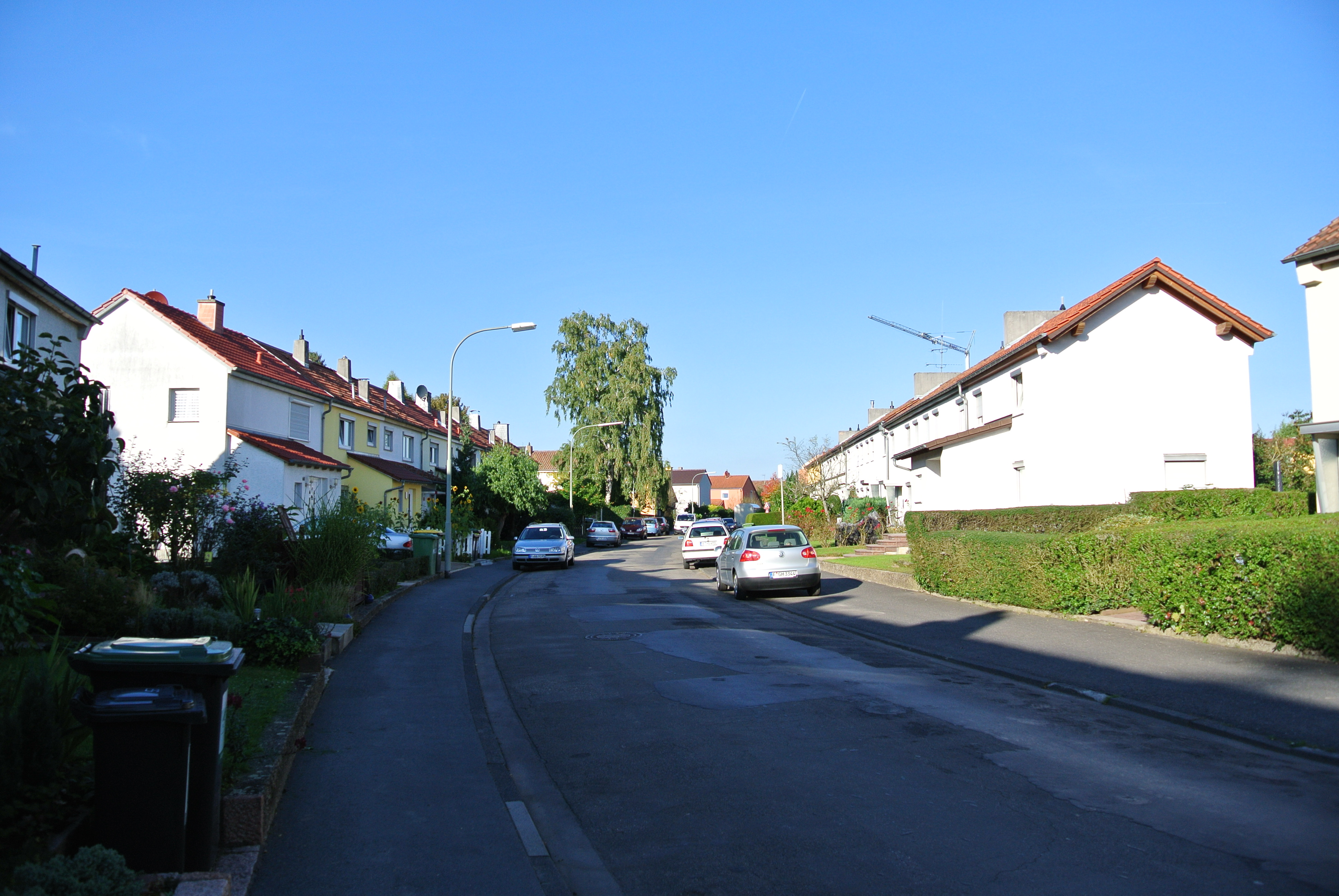 Siedlung Frankfurter Berg, Teilbereich Bizonale Siedlung von 1948 Rotdornweg